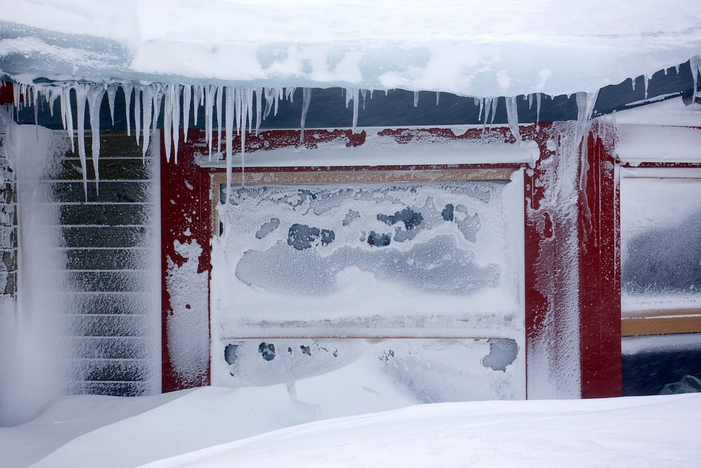 Vinterfönster, Storulvåns fjällstation.